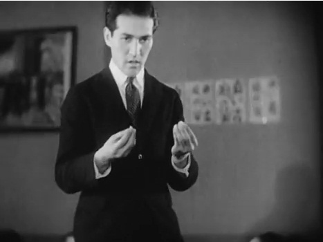 『大人の見る絵本 生れてはみたけれど』、1932年